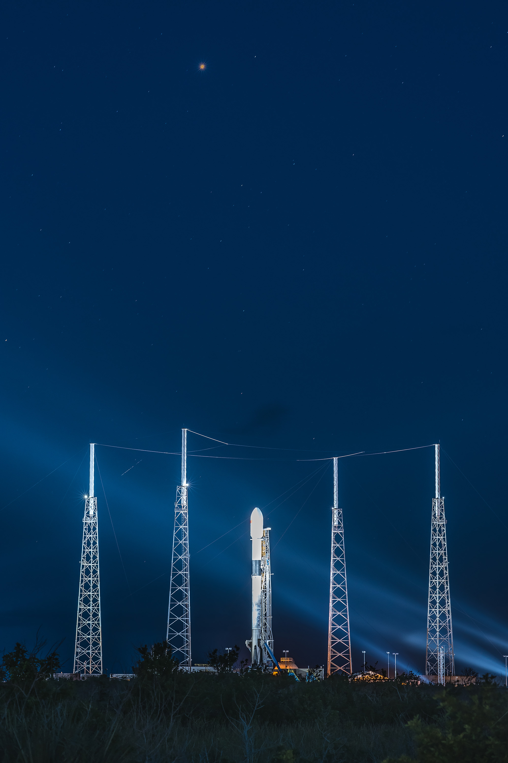 Merah Putih